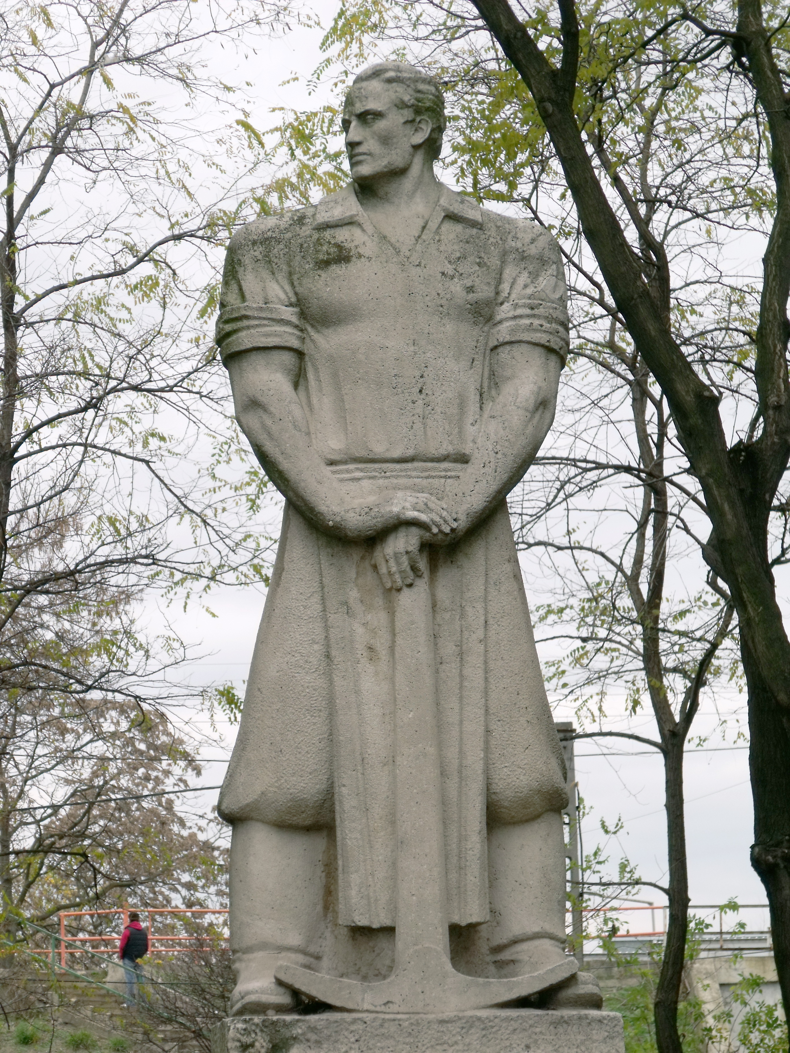 A Csákányozó szobra a Pongrác-telep I. és II. épülete között